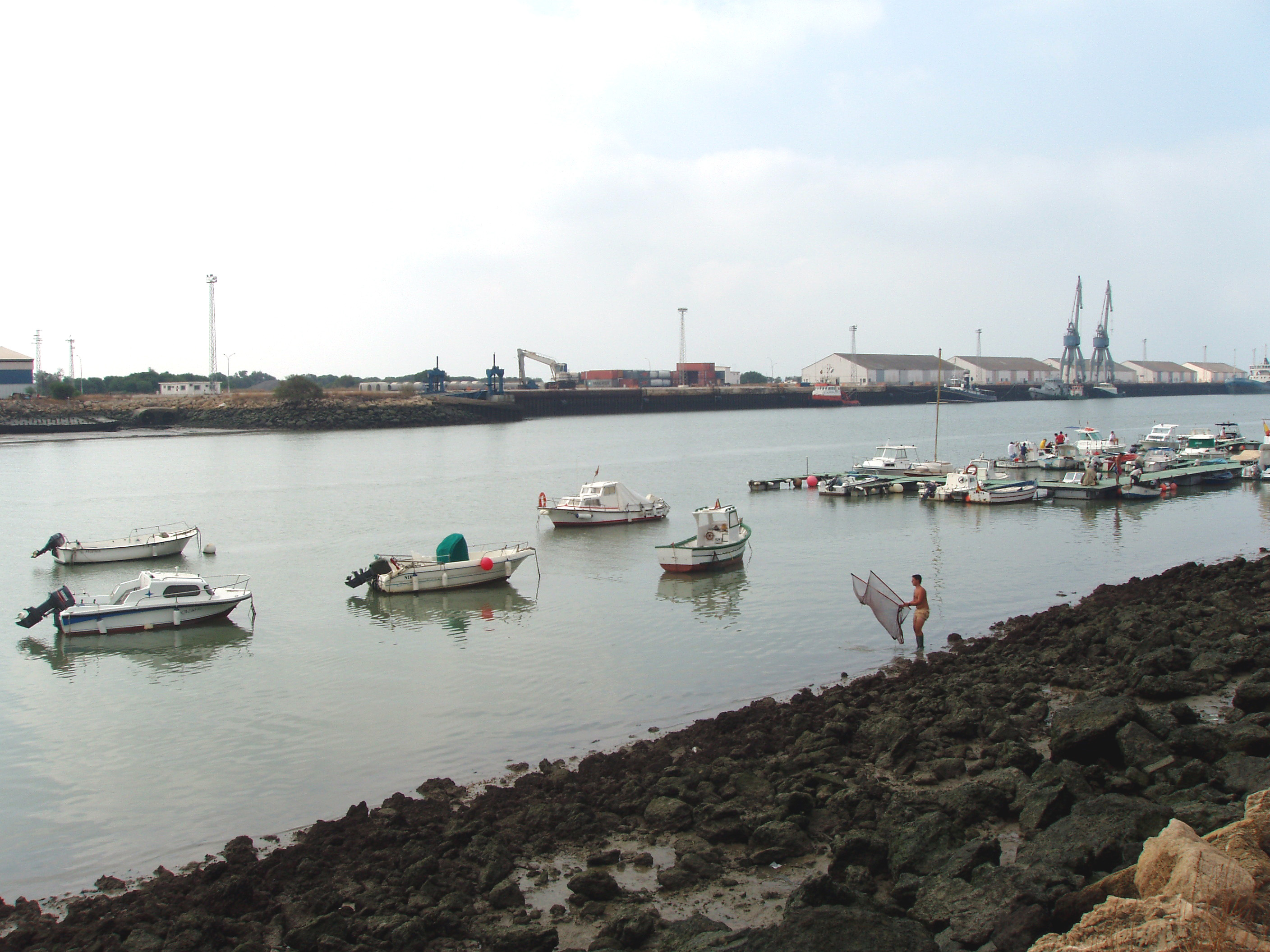 desembocadura del río Guadalete, en El Puerto de Santa María (Cádiz).